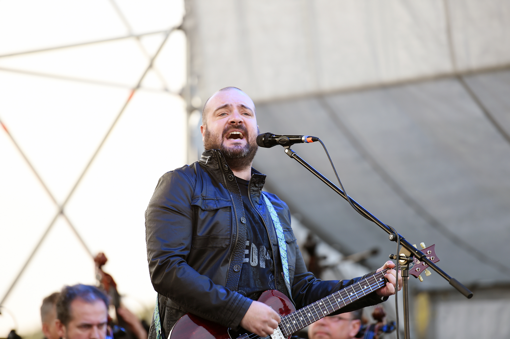 Ivan Tásler, Hudba Európy na Devíne, júl 2016.